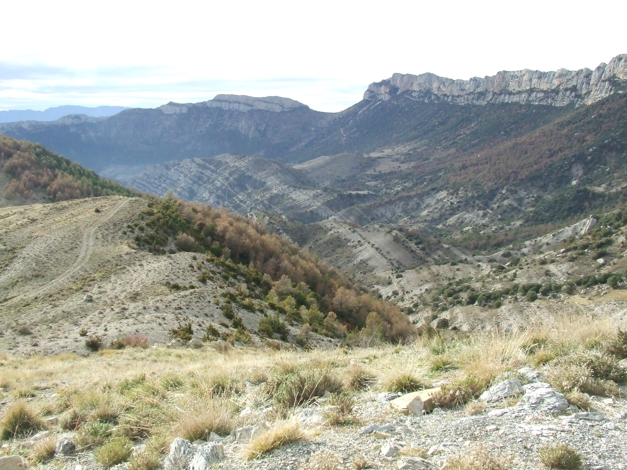 El barranc de la Vall (Abella de la Conca, Pallars Jussà)